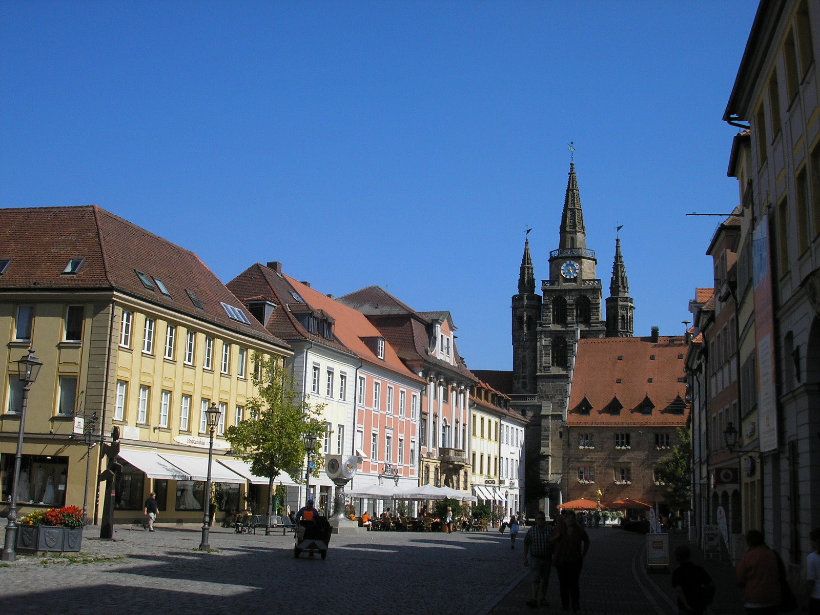 Blick über den Martin-Luther-Platz in Ansbach (Mittelfranken).